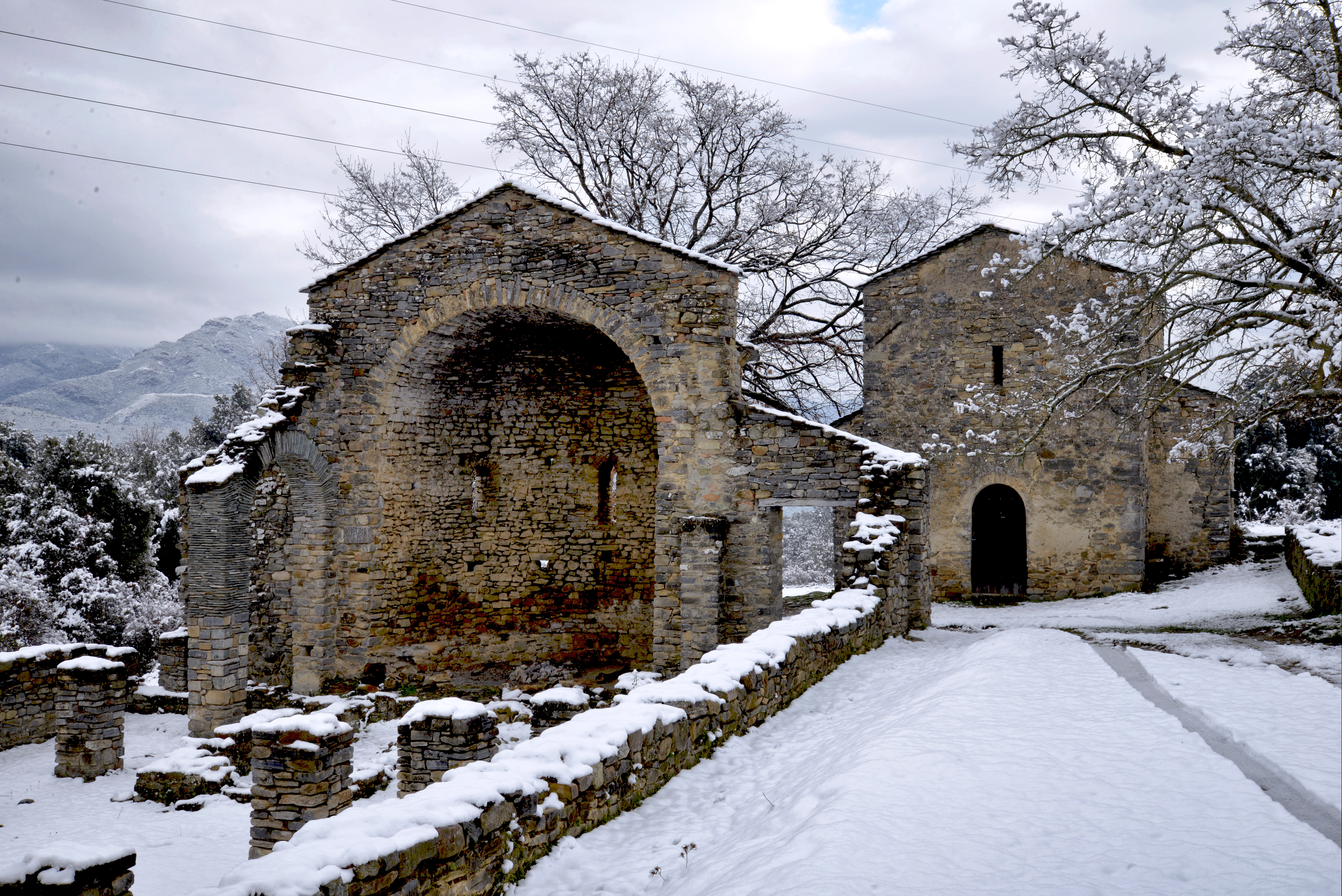 Corte, Centre Corse (France) - Façades occidentales de l'ensemble (église et baptistère) San Govanni Battista, classé Monument historique